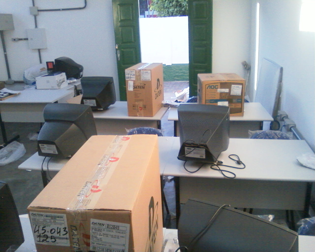 CDC Tiro de Guerra - Imagem das Máquinas Ainda Encaixotadas em outubro de 2009, no TG 06 - 023